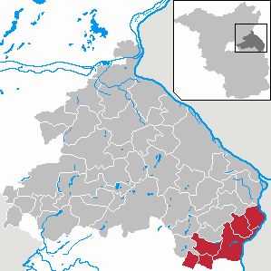 Amt Lebus in Brandenburg (Country) - District Märkisch-Oderland